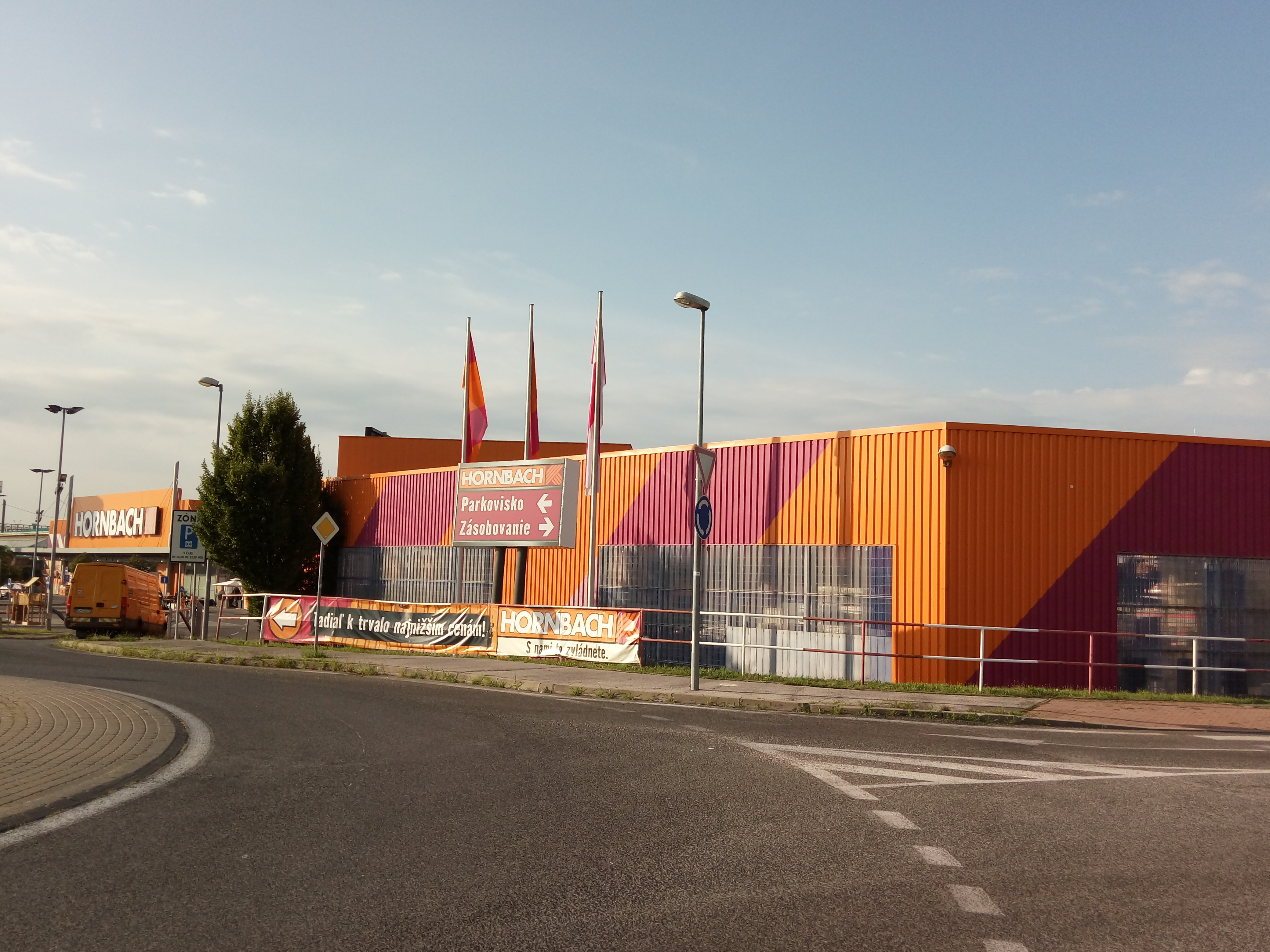 Hornbach Bratislava